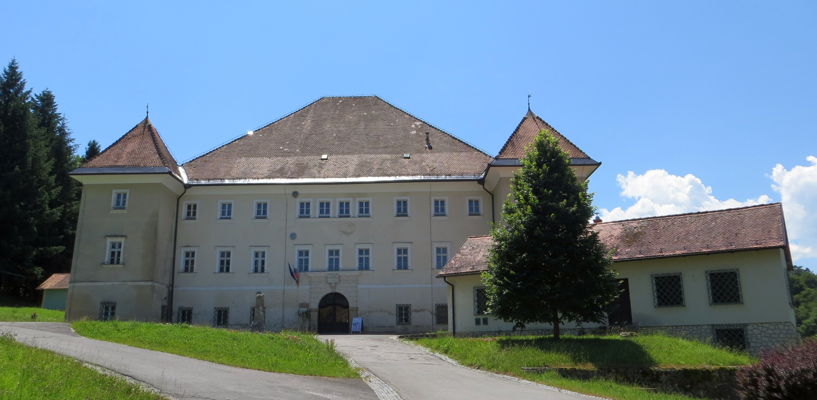 Schloss Witschein Nordseite